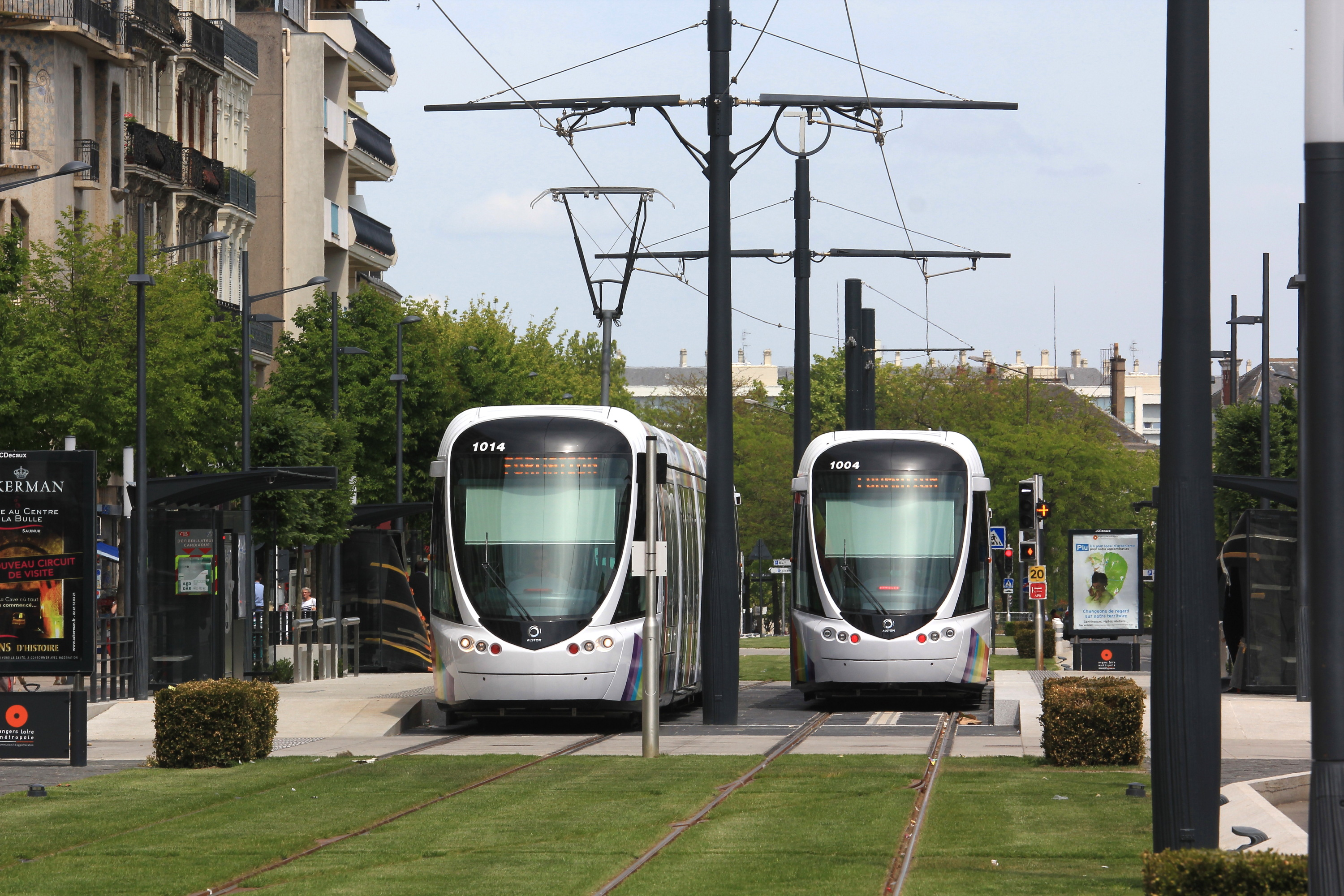 Les rames Citadis n°1004 et 1014 du tramway angevin à la station Foch - Maison Bleue. La rame de droite a son pantographe baissé car elle va entrer sur la zone équipée de l'alimentation par le sol.